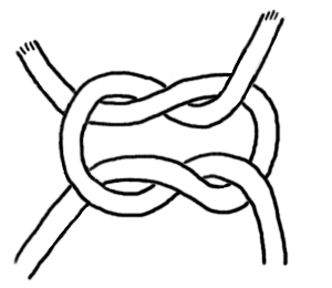 Zeichnung Kreuzknoten